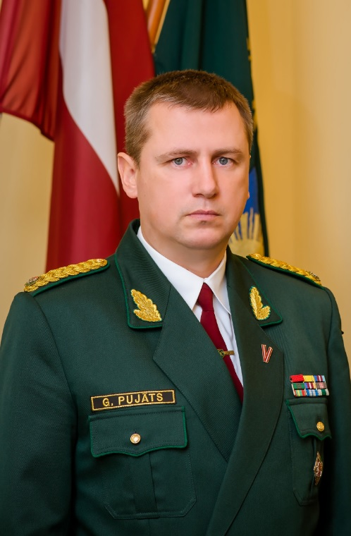 Guntis Pujāts